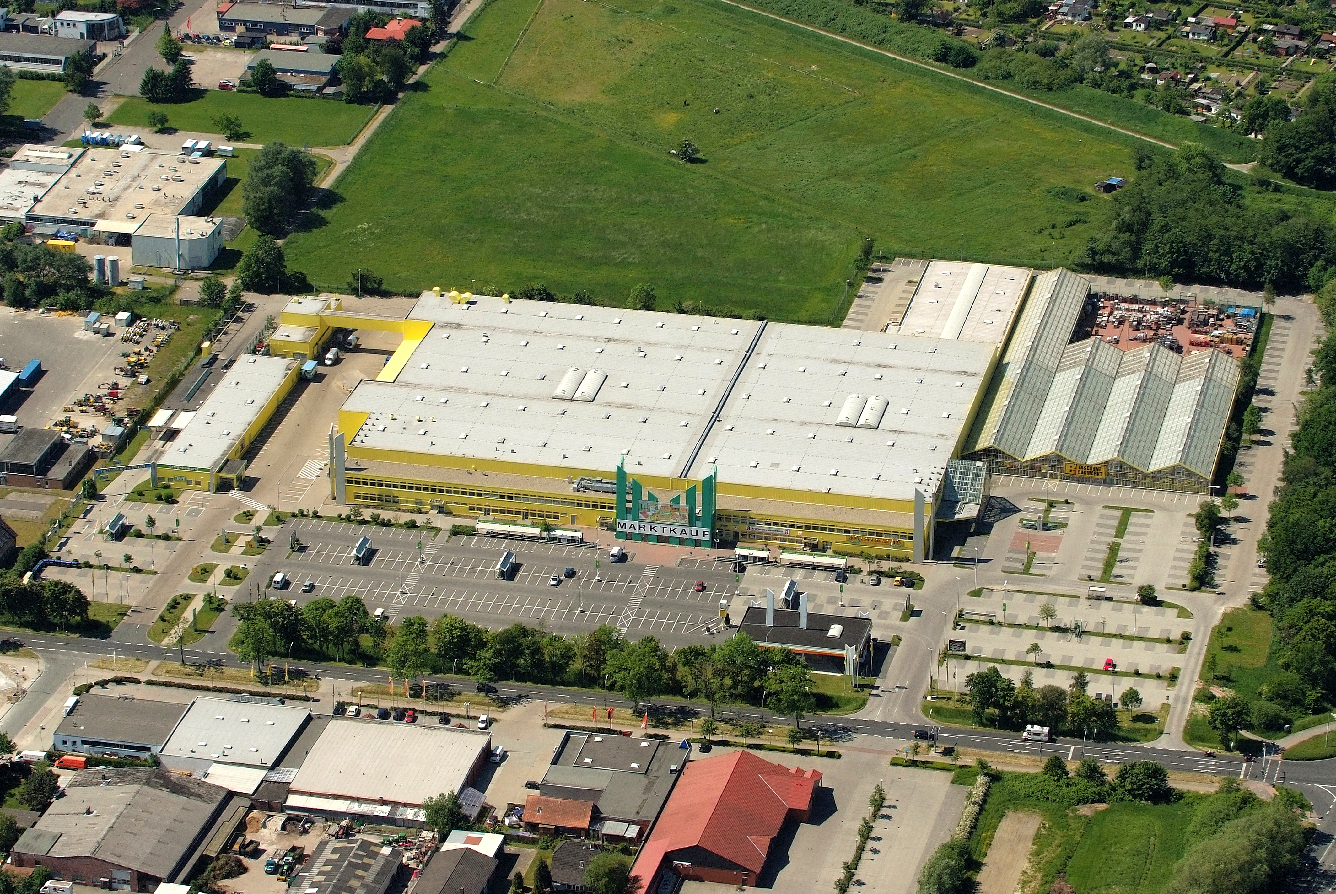 Fotoflug vom Flugplatz Nordholz-Spieka über Cuxhaven und Wilhelmshaven